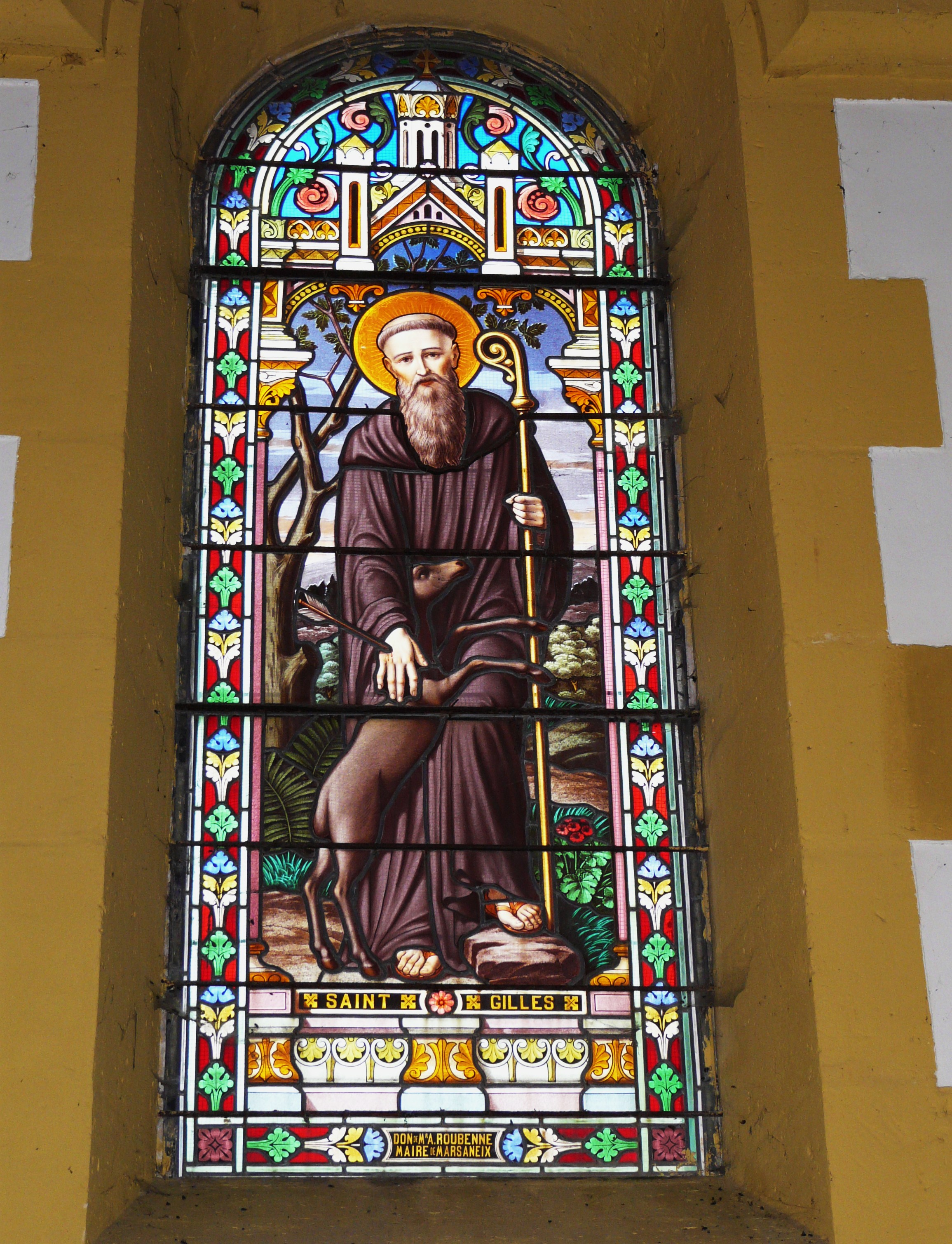 Vitrail représentant Saint-Gilles, église Saint-Gilles, Marsaneix, Dordogne, France